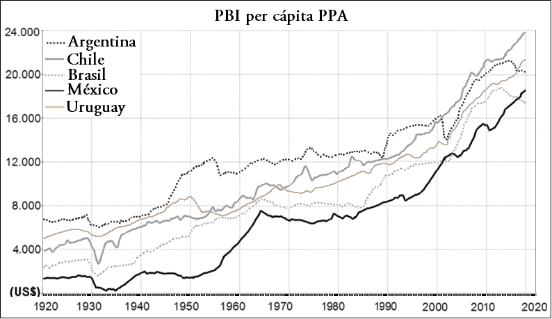 Pbi pér cápita Latinoamerica 1920 2020